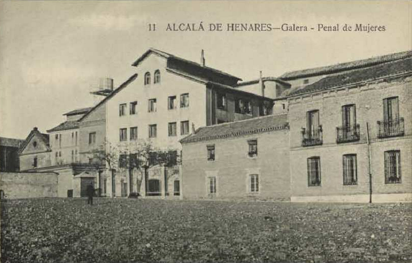 Postal de la fachada del penal de mujeres "La Galera" de Alcalá de Henares (Comunidad de Madrid - España). Construido en 1883 con las trazas de los arquitectos Tomás Aranguren Sanz y Celestino Aranguren; y clausurado en 1978.